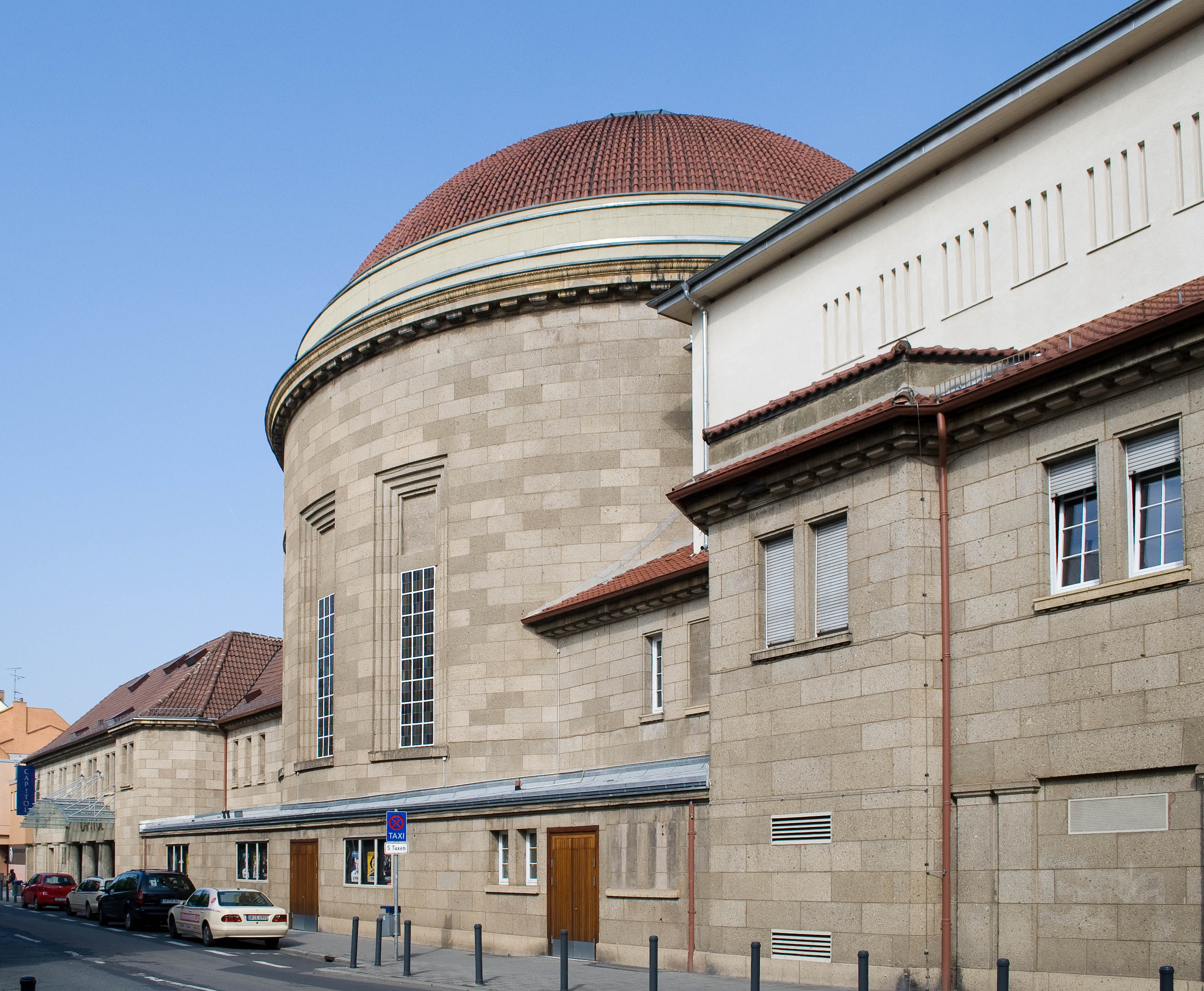 Das Capitol in Offenbach am Main ist die ehemalige Synagoge der Stadt und heute ein Kultur- und Veranstaltungszentrum.